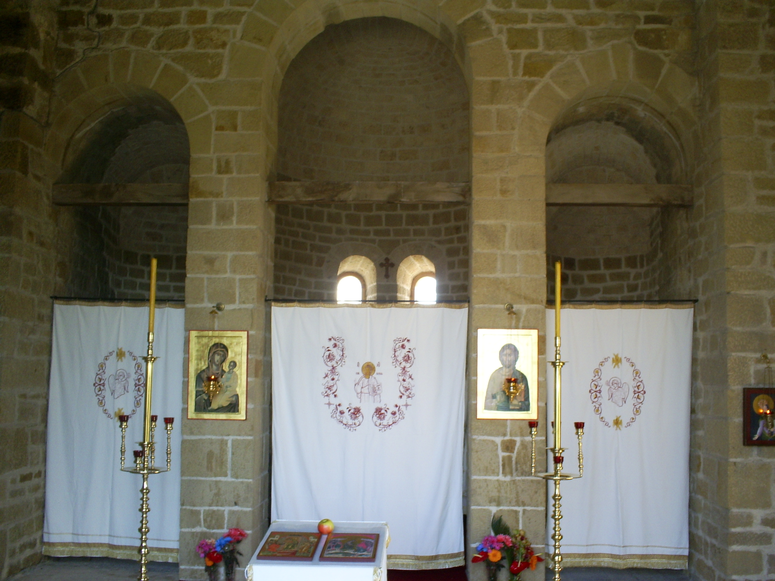 Manastir Djurdjevi stupovi - unutrasnjost manastirske crkve